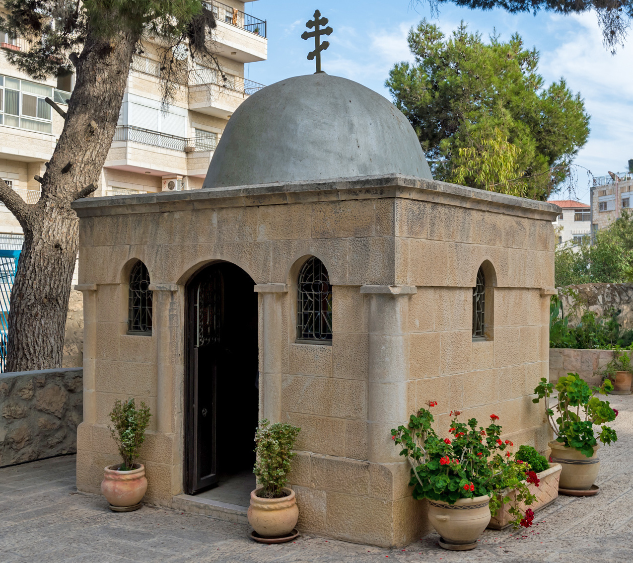 Часовня Марфы на русском подворье в Вифании